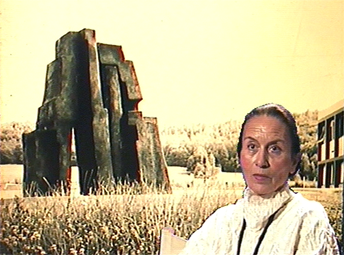 Portrait de Parvine Curie